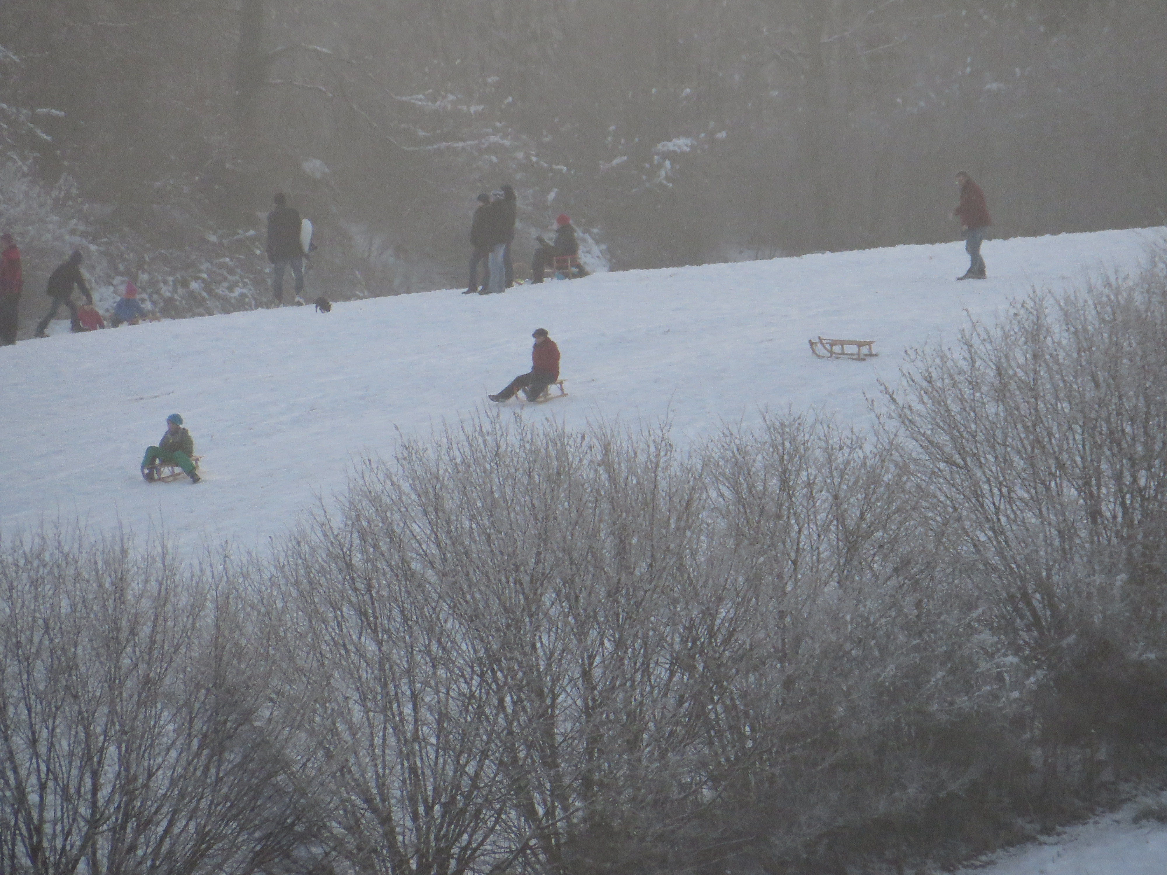 Rodelhänge des Osbektals (Flensburg-Mürwik), Januar 2015, Bild 09